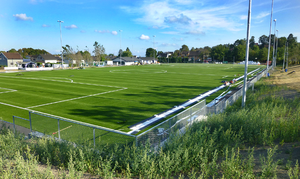 fra Moss by leksjon